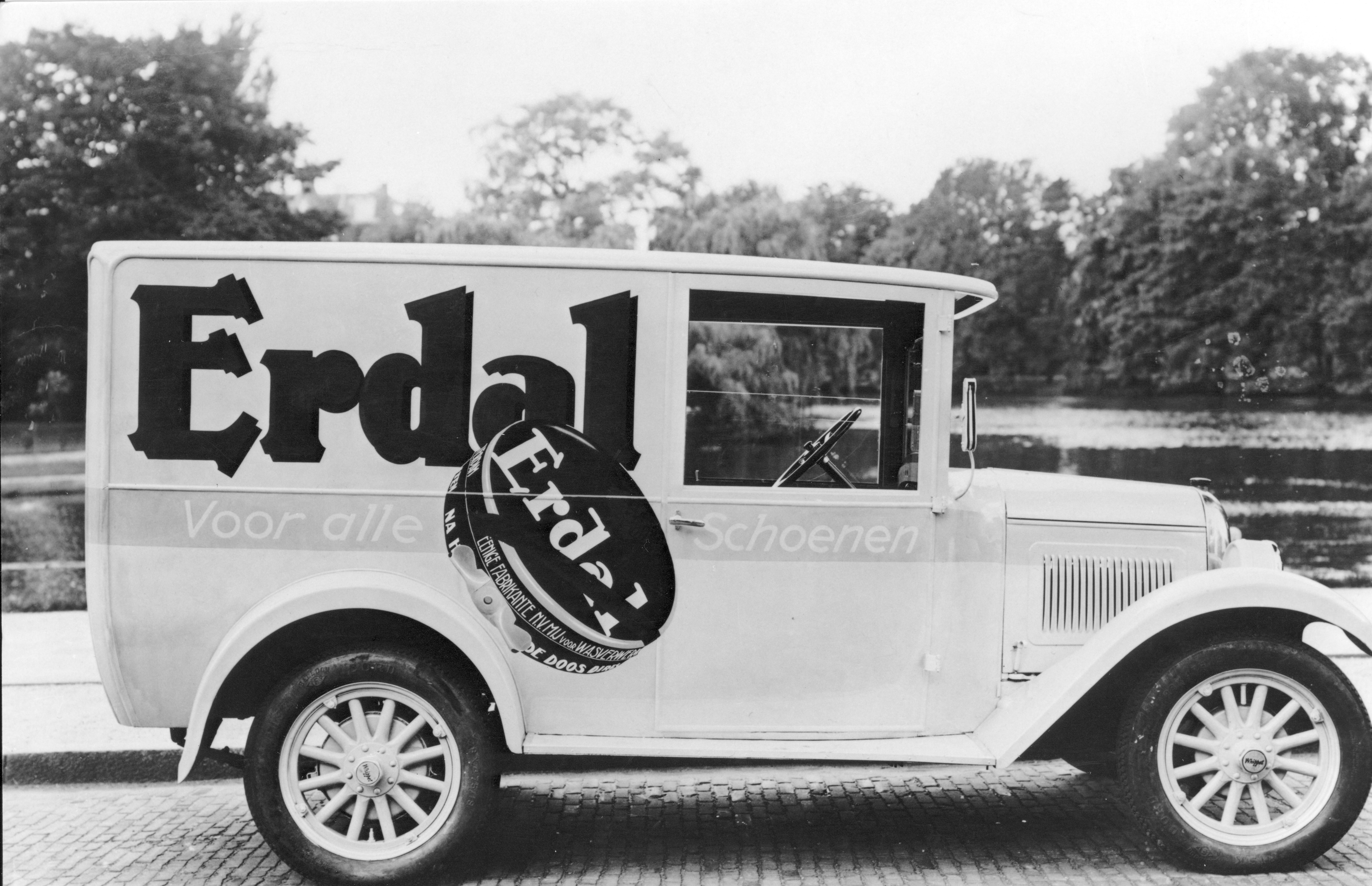 Bestelauto voor Erdal, gebruikt ongeveer 1916